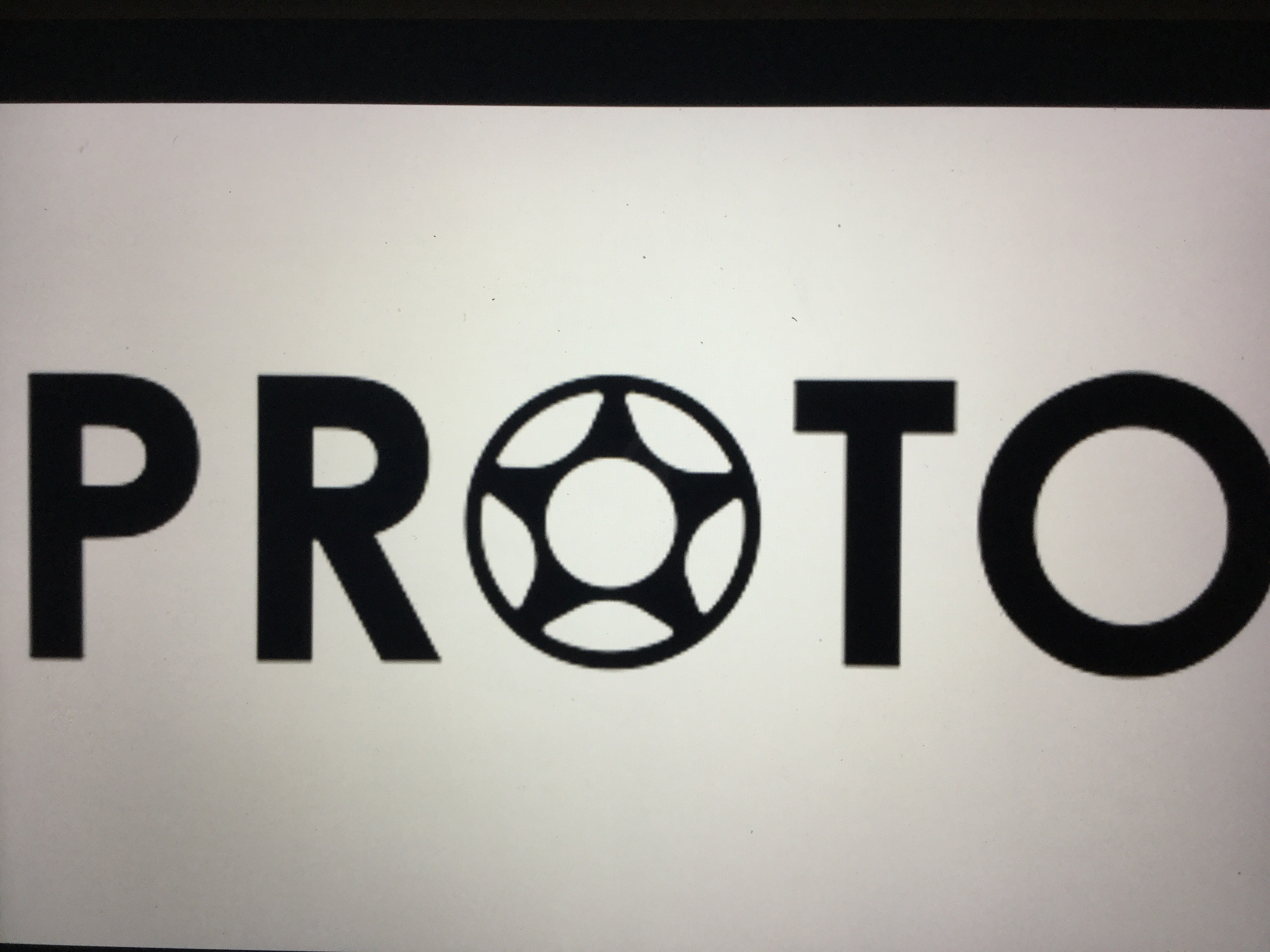 En una imatge del logo de la marca la qual parlo en el meu article